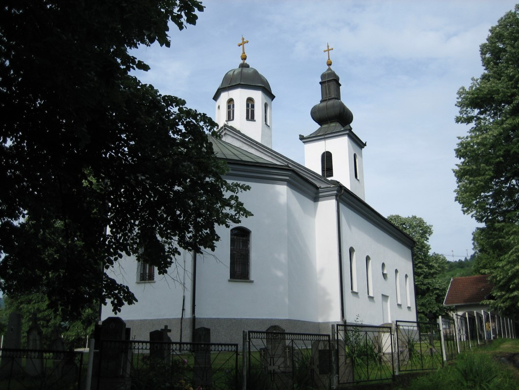 Pribojska crkva, Rođenja presvete Bogoredice, je jedna od najstarijih crkava u podmajevičkom kraju. Gradnja crkve je počela davne 1880. godine, crkva je sazidana sva od kamena a svodovi su urađeni od sige,te iste godine završeno je i prekrivanje crkve. Konačno dovršetak crkve je bio 1883. godine. Prvobitni crkveni ikonostas je izradio učitelj Mirko, koji je tada služio u srpskoj školi u Priboju. Crkveno osvećenje je bilo 22.avgusta 1883. godine, na dan Sv. mučenika Agatonika. Tadašnji Mitropolit tuzlanski je upućivao narod da slavu ovog hrama održavaju na Malu Gospojinu. Ali sledeće godine narod se spontano okupio ispred crkve na „Arlijevdan“, tako da su popovi morali da održe bogosluženje, i samim tim narod je zaveo ovaj Crkveni sabor, koji je i dan danas jedan od najvećih u ovome kraju, i tako je slava ovoga svetoga hrama ostala da se slavi na dan Sv. mucenika Agatonika, poznatiji u narodu kao "Arlijevdan".